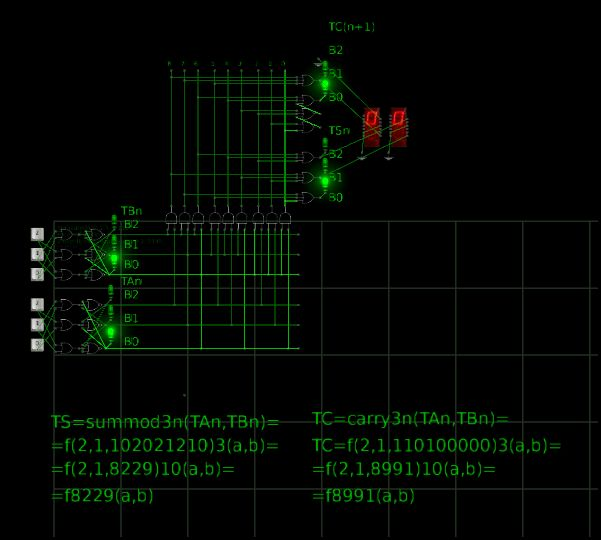 Снимок модели троичного полусумматора в несимметричной троичной системе счисления в трёхбитной одноединичной системе логических элементов в логическом симуляторе Atanua.